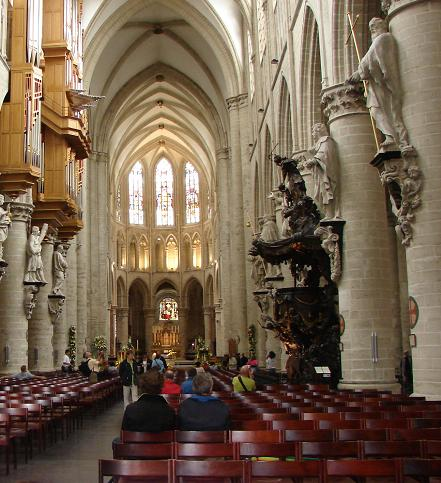 Wnętrze katedry św. Michała i św. Guduli w Brukseli